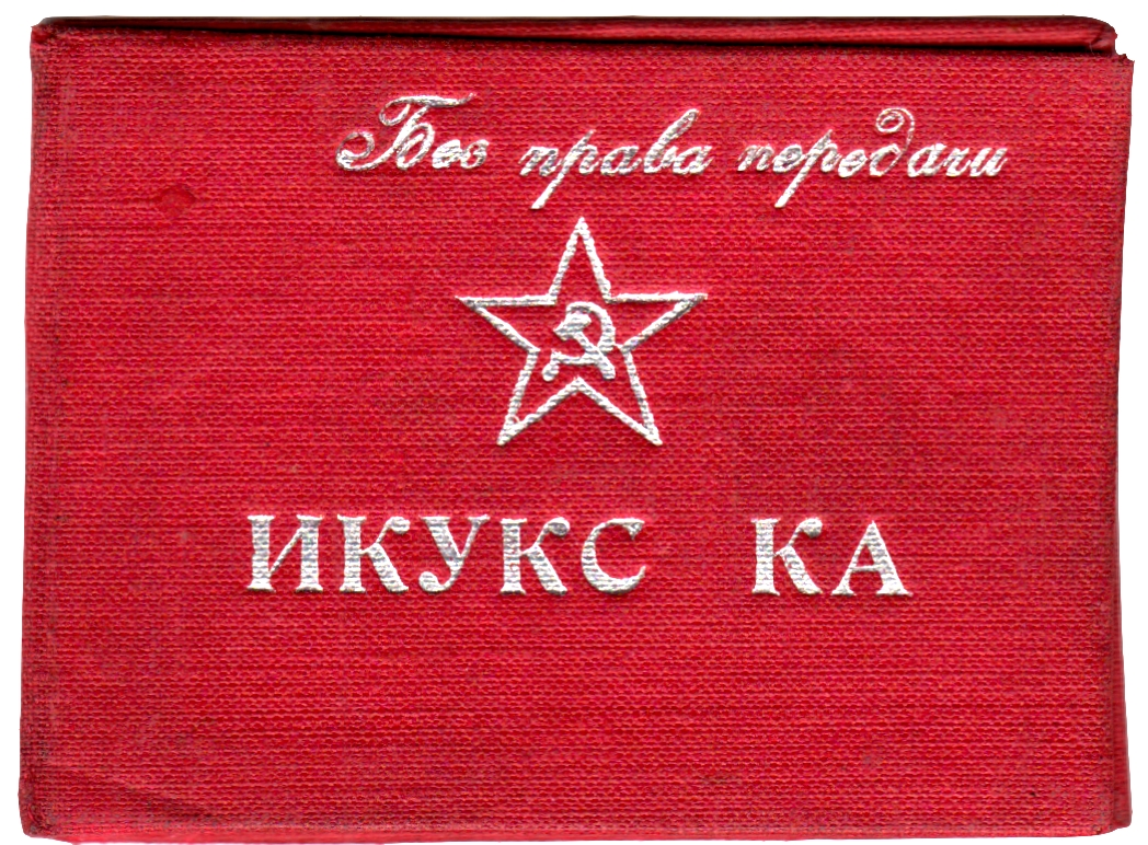 Обложка удостоверения: Курсы усовершенствования командного и начальствующего состава инженерных войск Красной армии (ИКУКС КА)